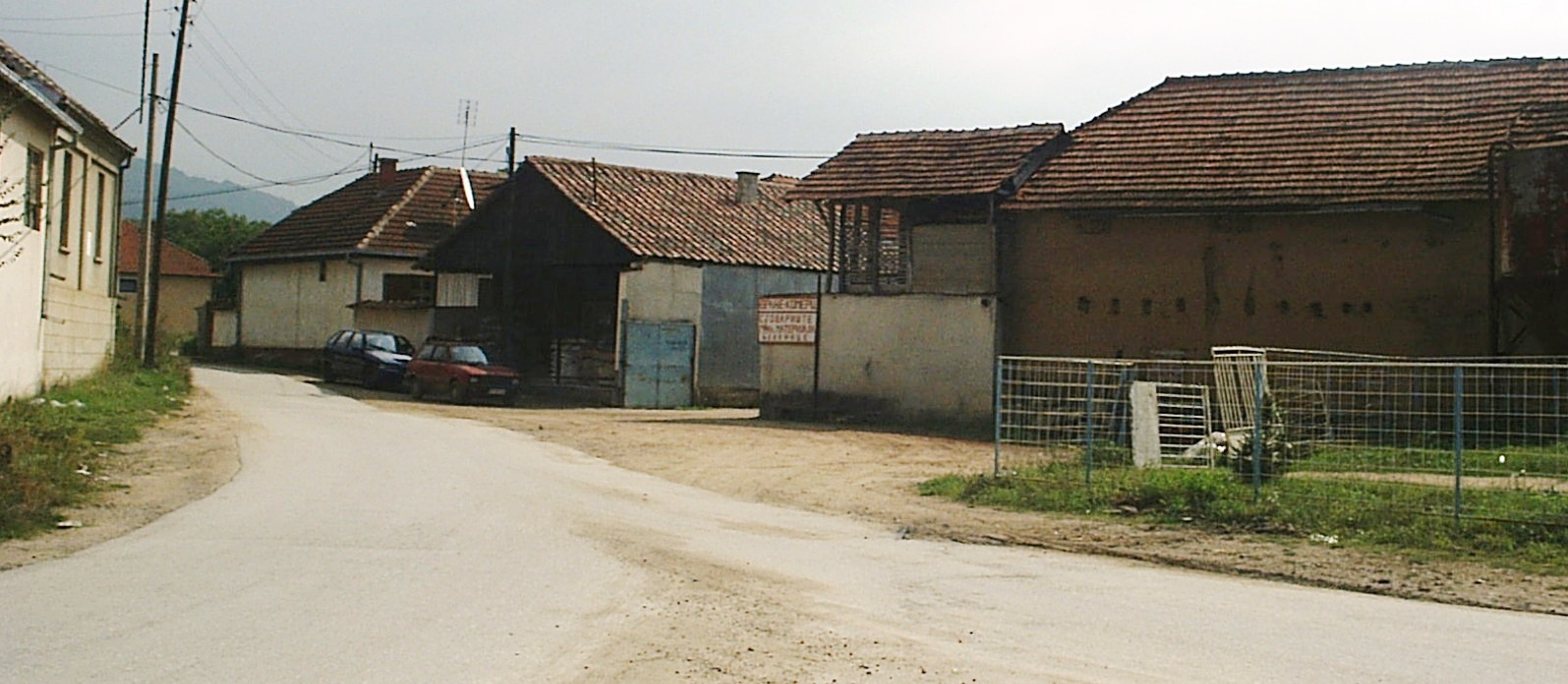 Алакинце.